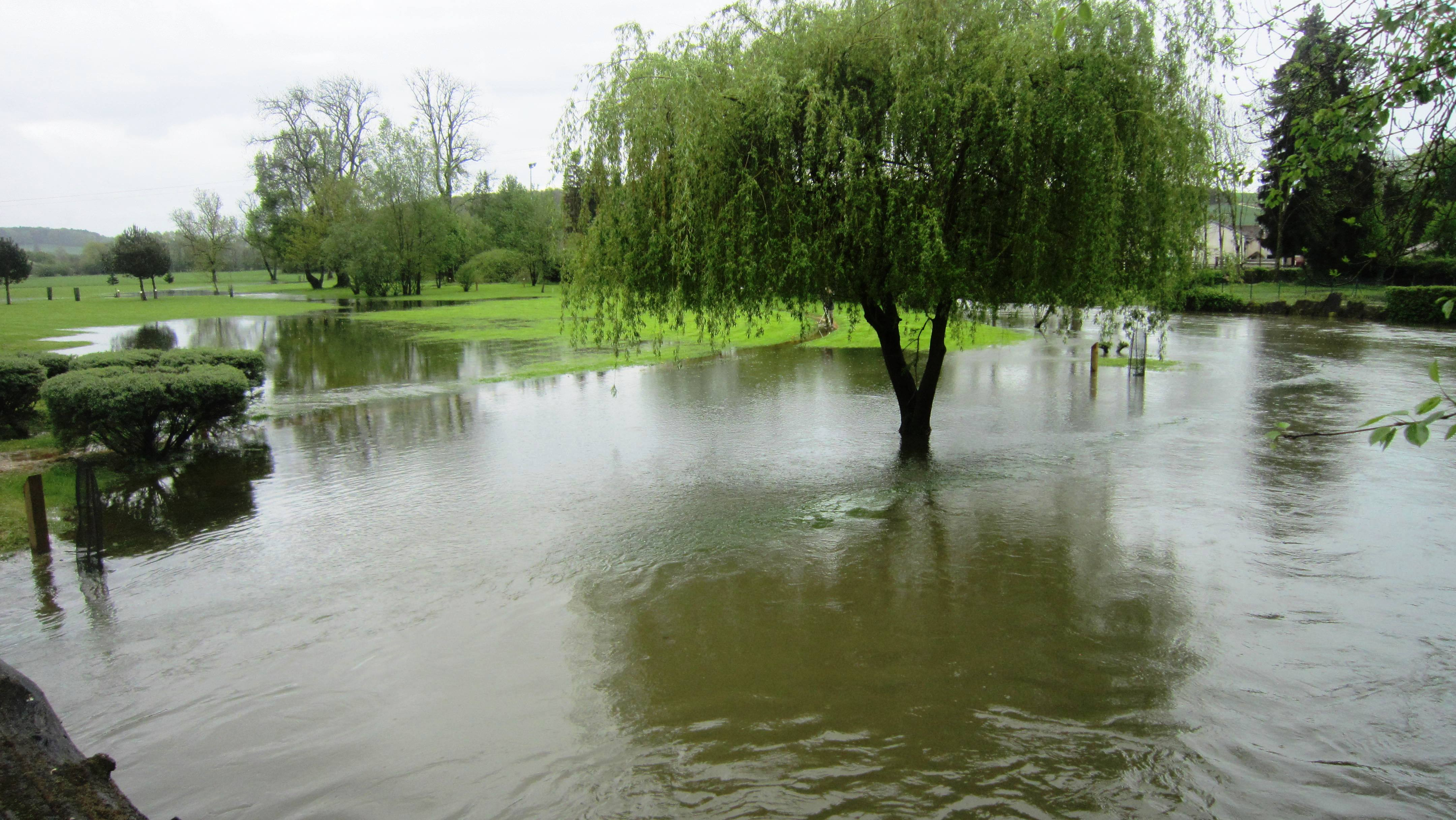 L'Ource en crue à Leuglay (Côte-d'Or) avril/mai 2015